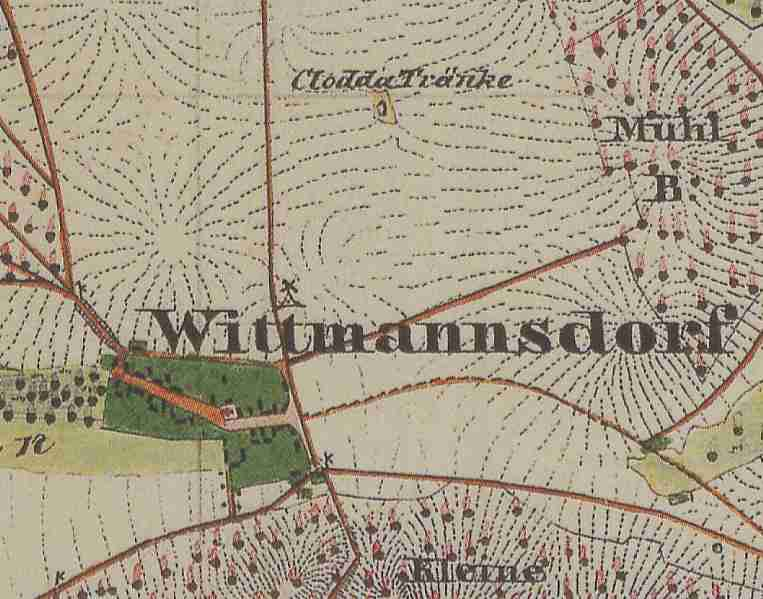 Wittmannsdorf, Gemeindeteil von Wittmannsdorf-Bückchen, Ortsteil der Gemeinde Märkische Heide, Landkreis Dahme-Spreewald, Brandenburg, Deutschland, Ausschnitt aus dem Urmesstischblatt 3950 Groß Leuthen von 1846